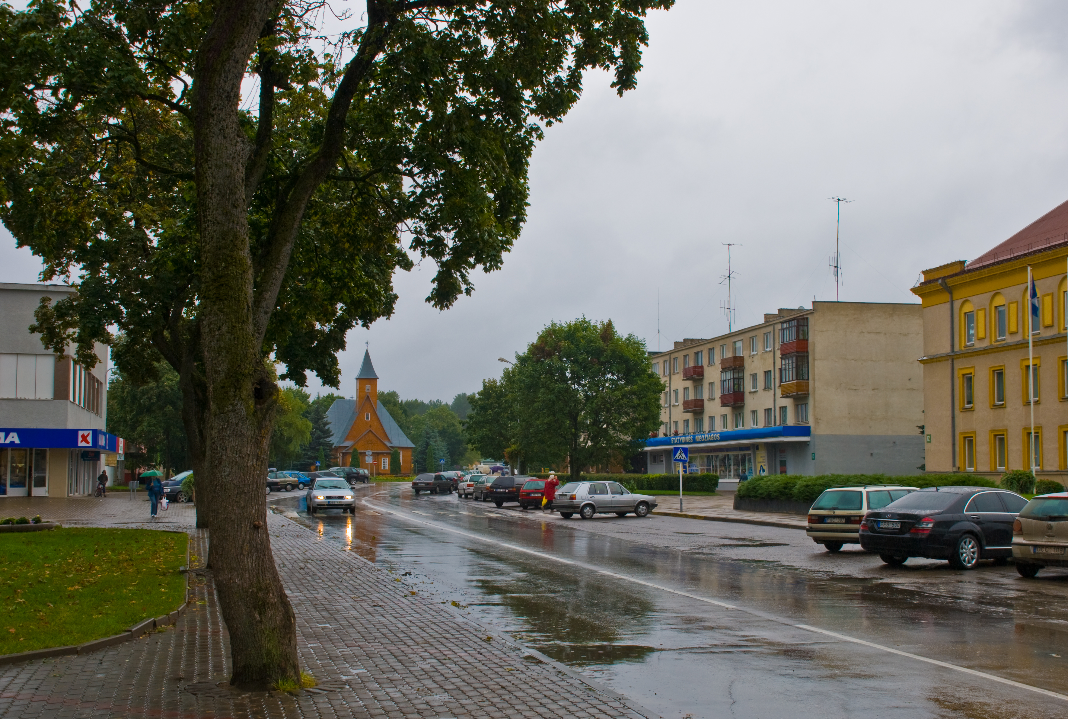 Varėna, Lithuania